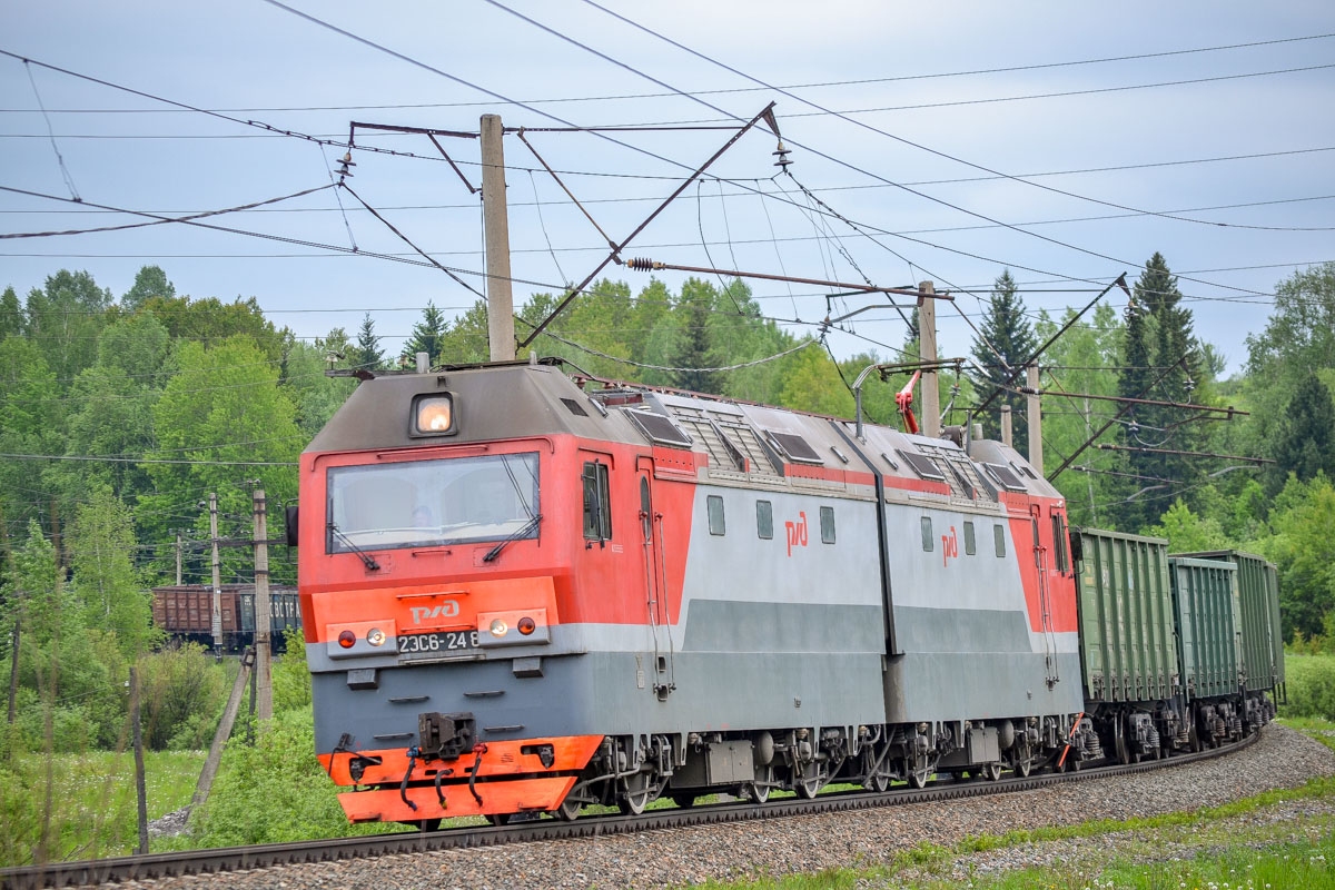 С завода поступил в депо Омск. 10.2013 — передан в депо Тайга. 10.2014 — передан в депо Омск. 01.2015 — передан в депо Тайга.